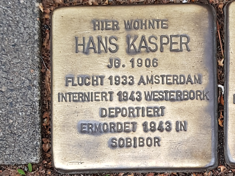 Stolperstein für Hans Kasper, Sternbuschweg 14, Duisburg-Neudorf, Jg. 1906, Flucht 1933 nach Amsterdam, interniert 1943 in Westerbork, deportiert, ermordet 1943 im Vernichtungslager Sobibor